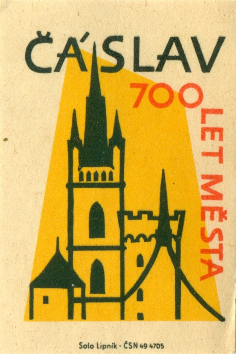 nálepka